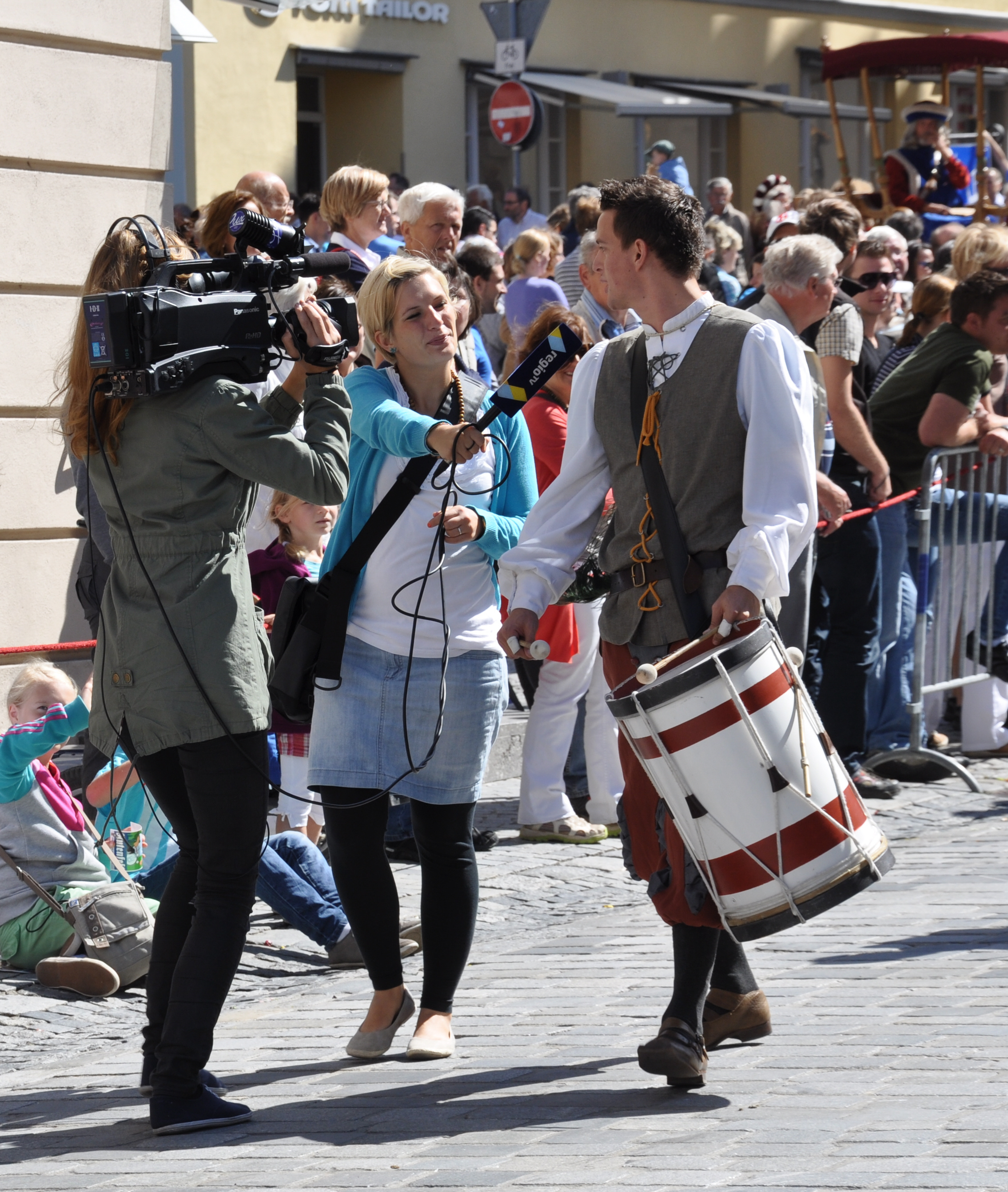 Rutenfest 2012, Festzug am Rutenmontag, Interview eines Regio-TV-Teams im laufenden Umzug